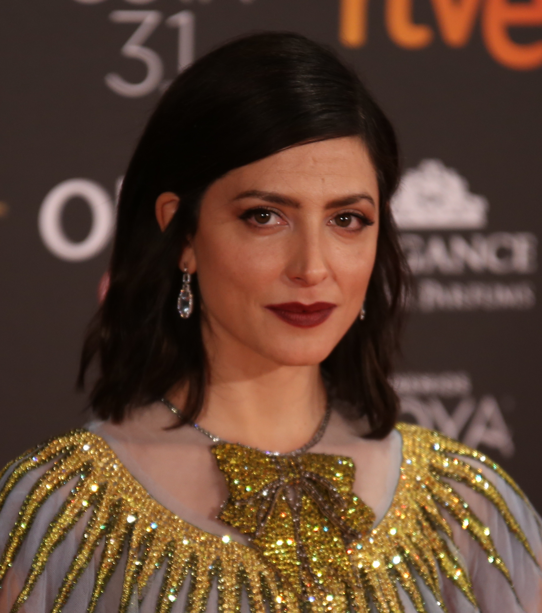 Premios Goya 2017